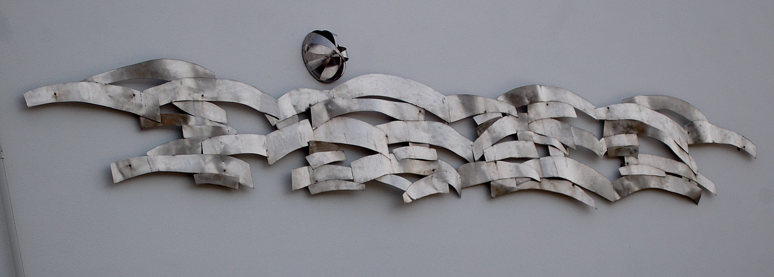 Vågspel av Lars Sjögren utförd i svetsad rostfri plåt på fasaden till Sundsta badhus.